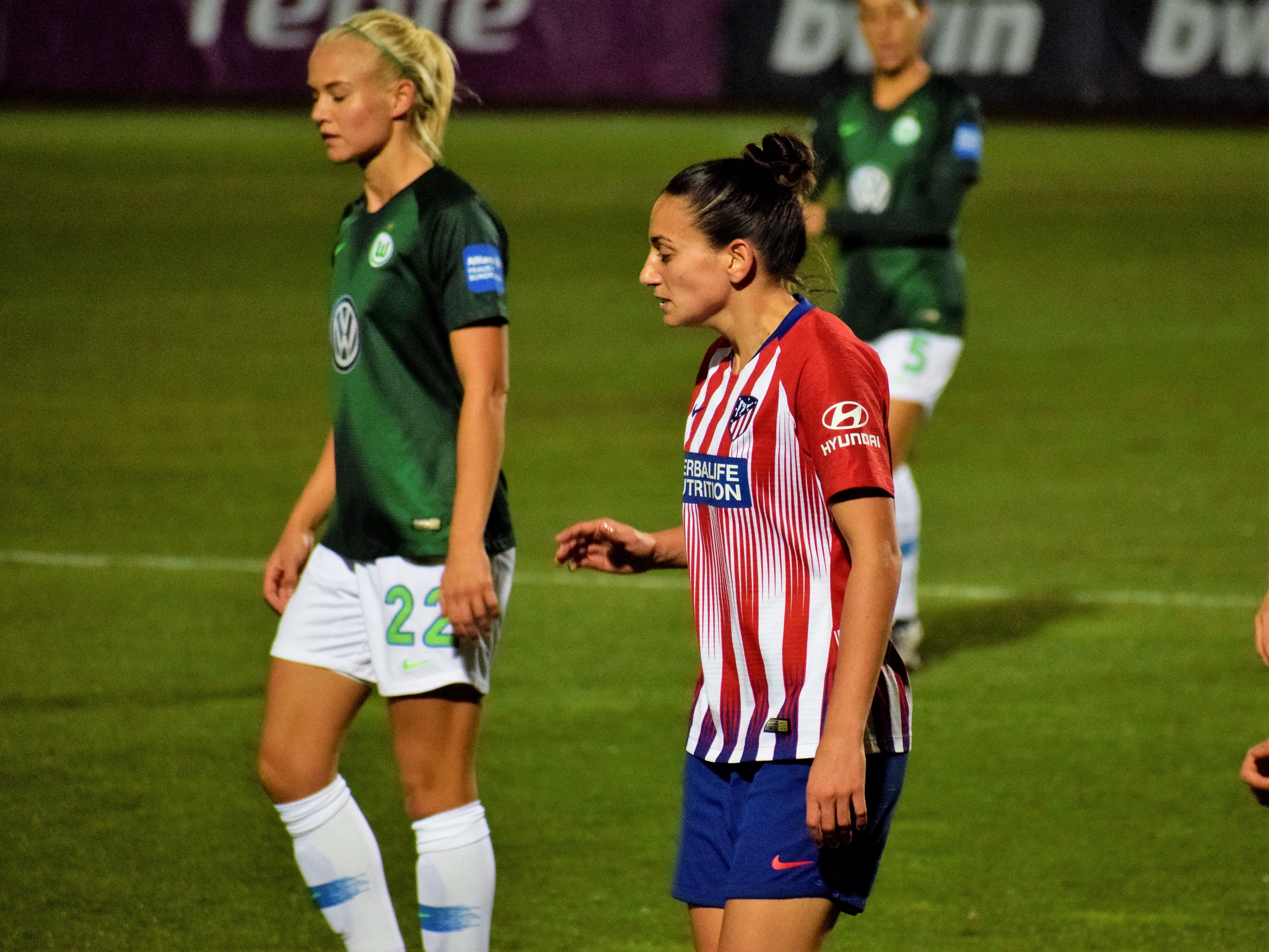 Aurelie Kaci jugando con el Atlético de Madrid ante el Wolfsburgo